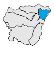 Real en el Capcir. Mapa fet a partir d'un altre de lliure disposició